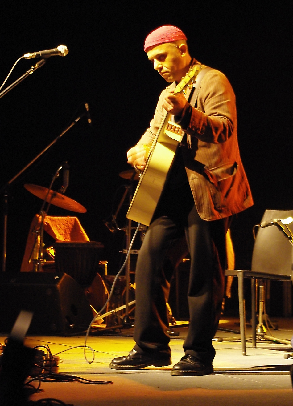 Erez Lev-Ari performance all'"Hanger 11"